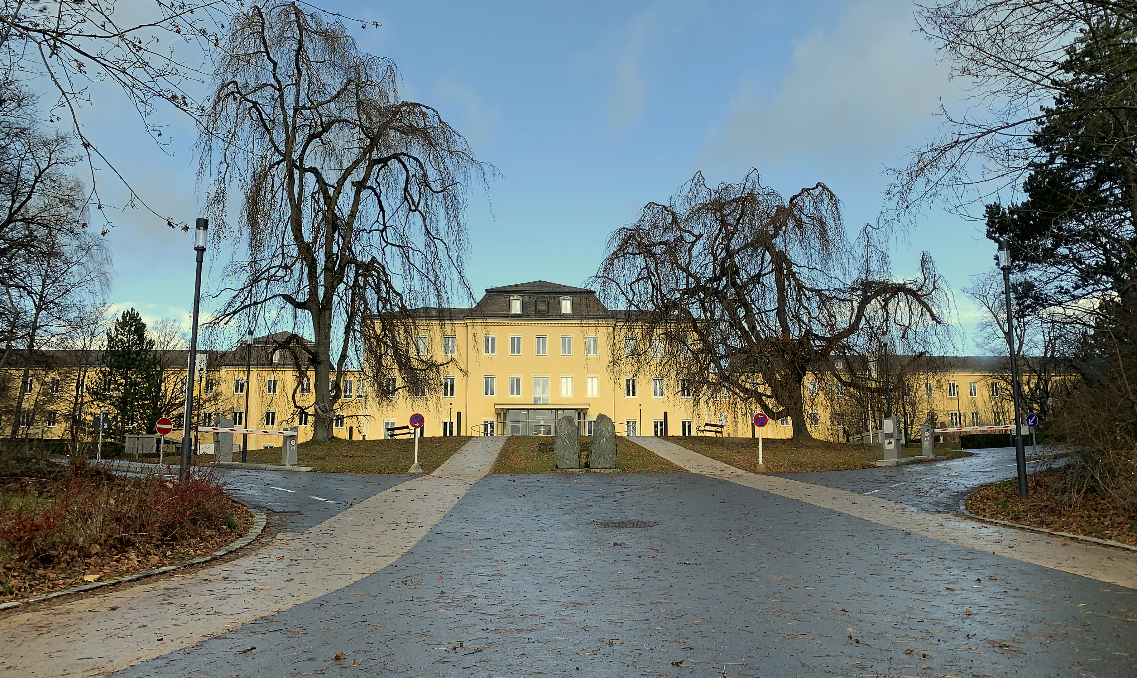 Haupteingang des Bezirkskrankenhaus Kaufbeuren